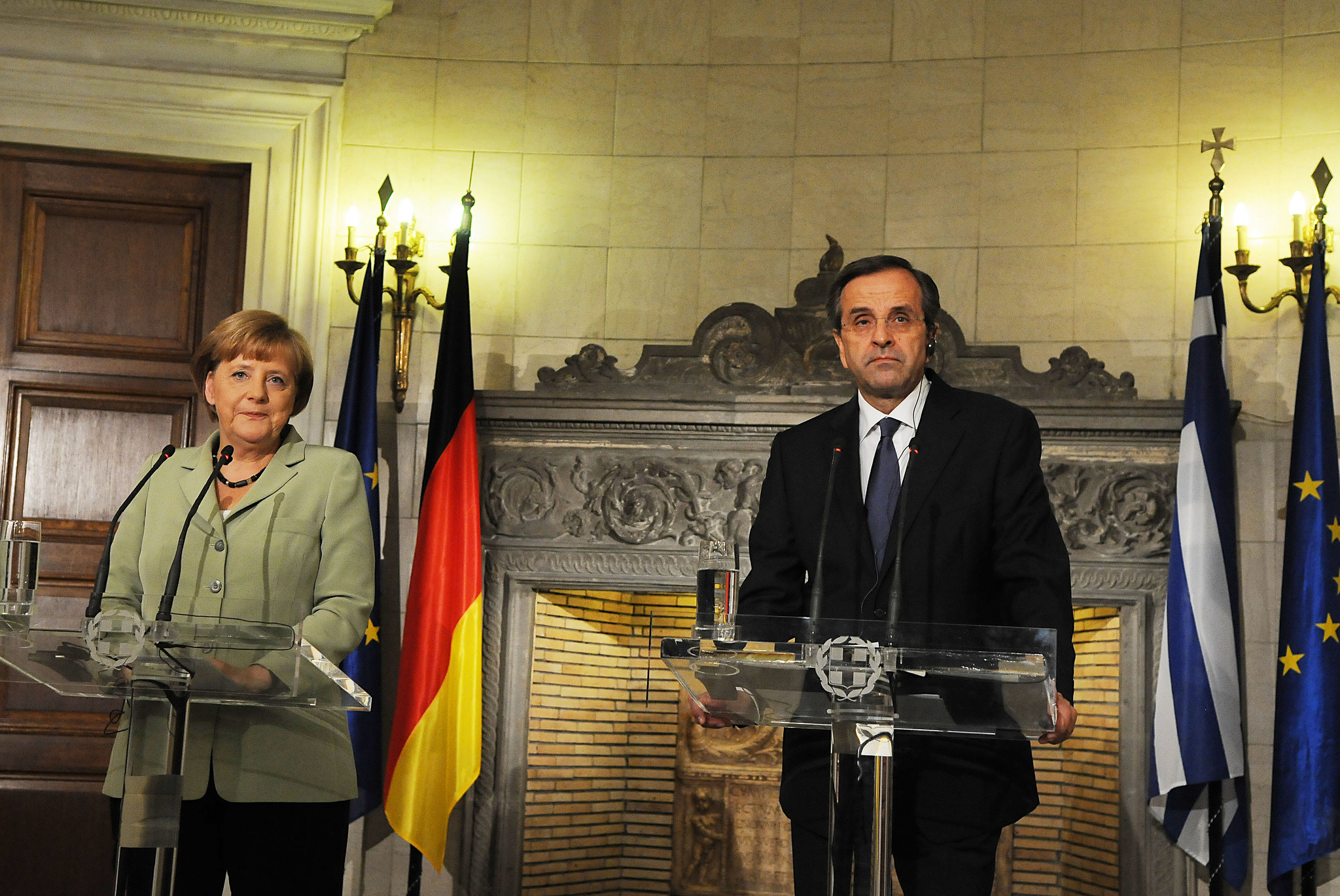 Αντώνης Σαμαράς - Angela Merkel - Επίσκεψη στην Αθήνα